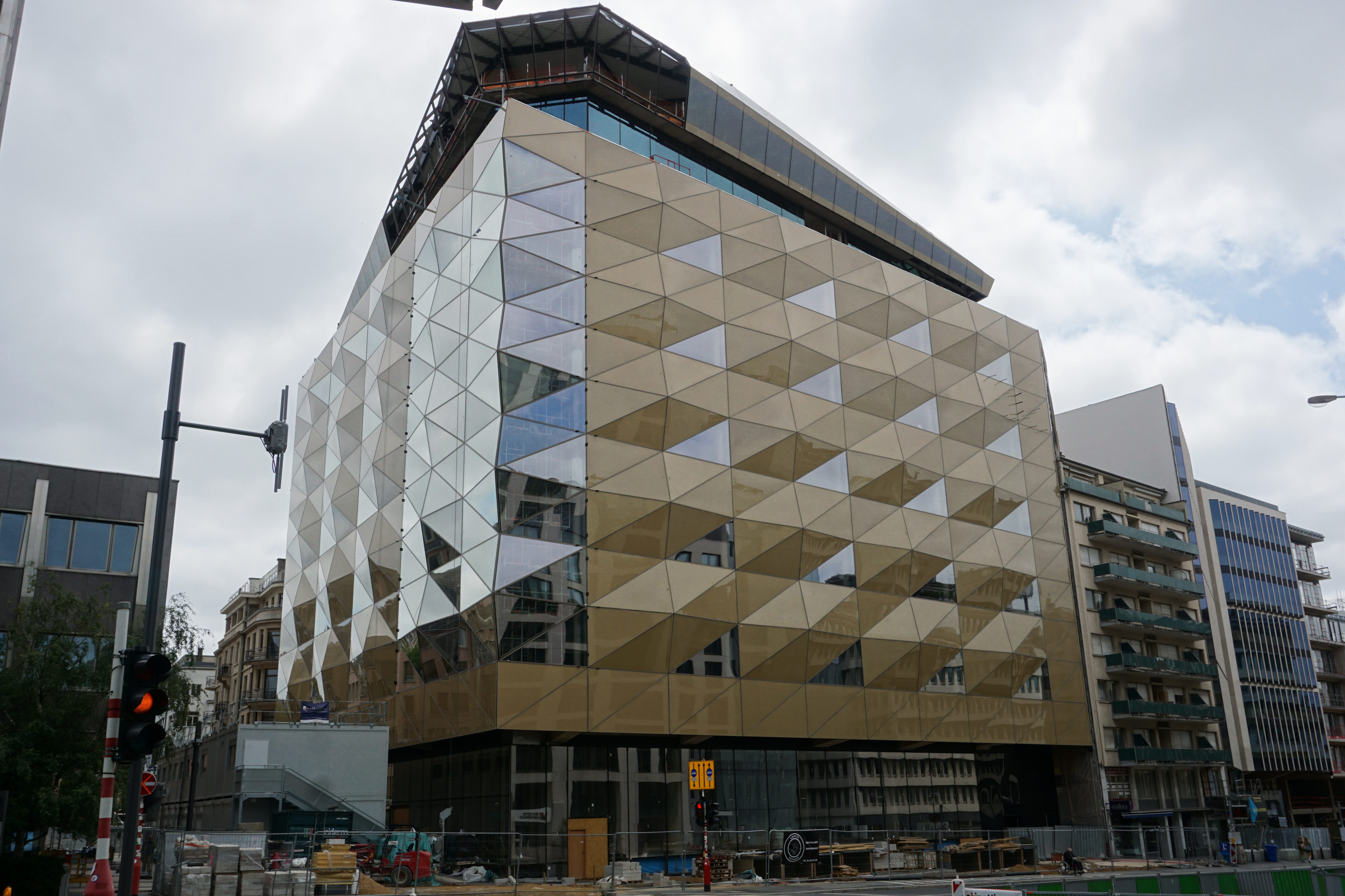 De Schantjen «Royal Hamilius» am Juli 2019. Galeries Lafayette.